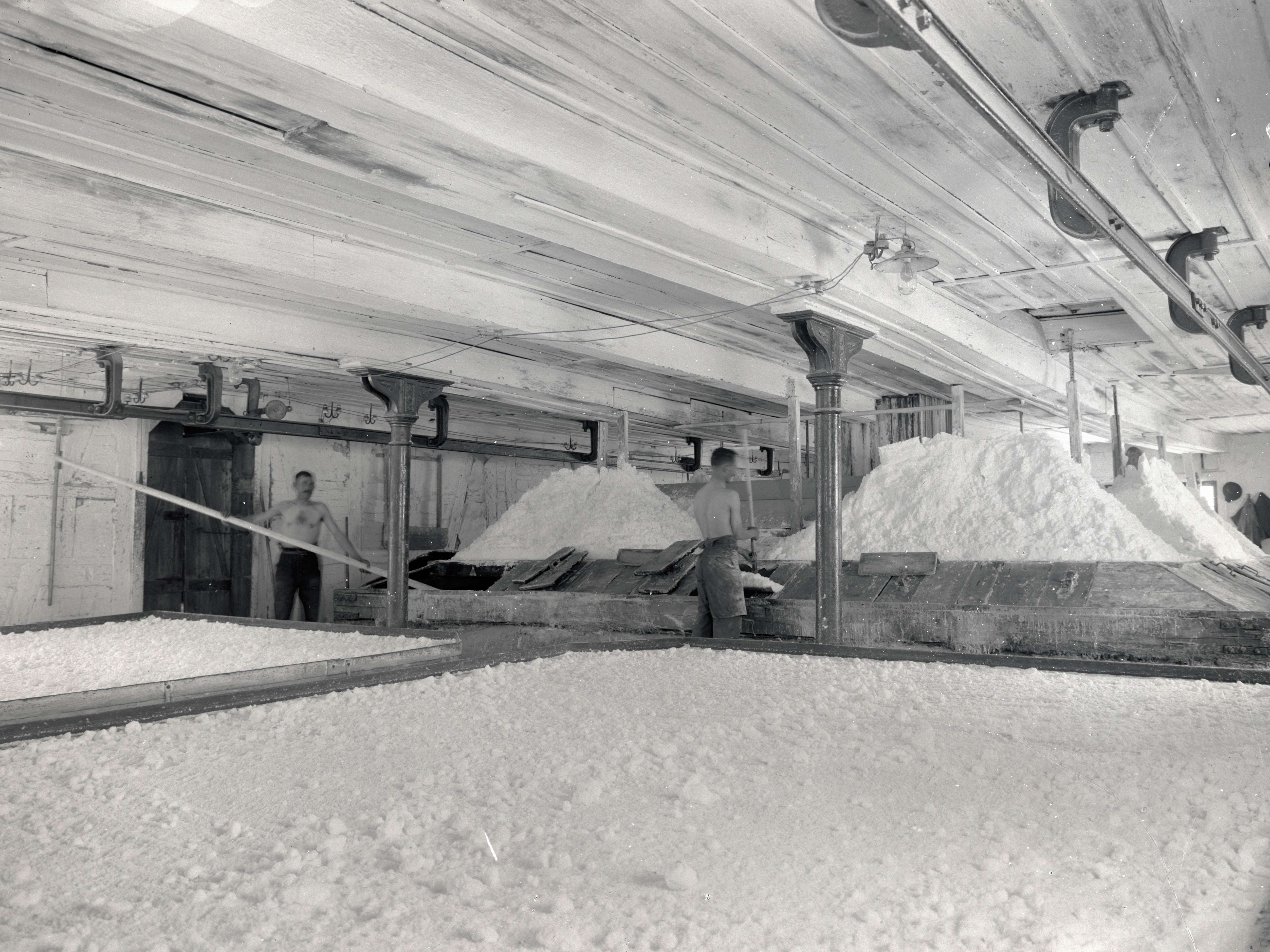 Saline Wilhelmshall bei Rottweil